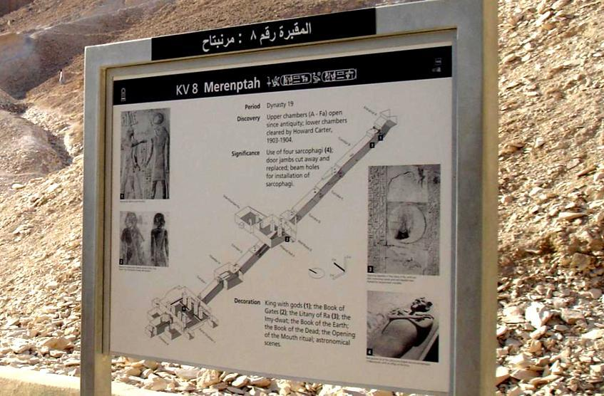 KV8 - Placa informativa próxima à entrada